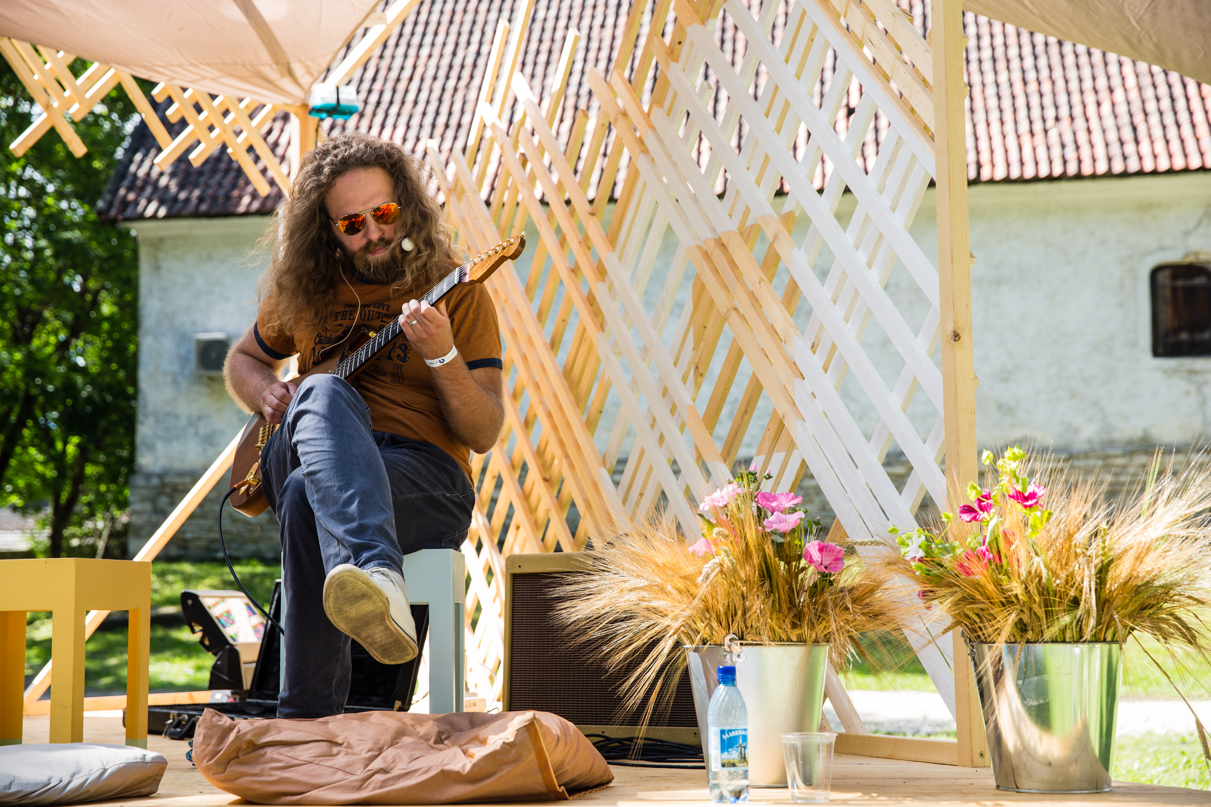 Oleg Pissarenko